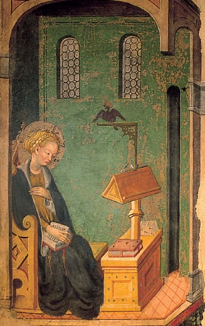 Vergine annunciata, tempera, Castello di Montechiarugolo, Italia